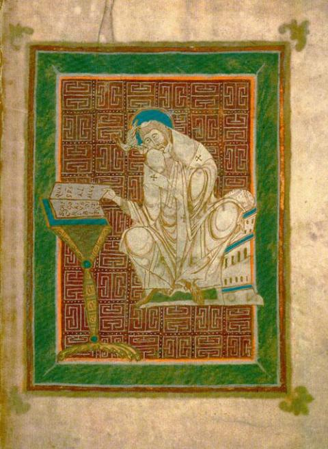 Heiliger Gregor im Reichenauer Evangelistar von 970